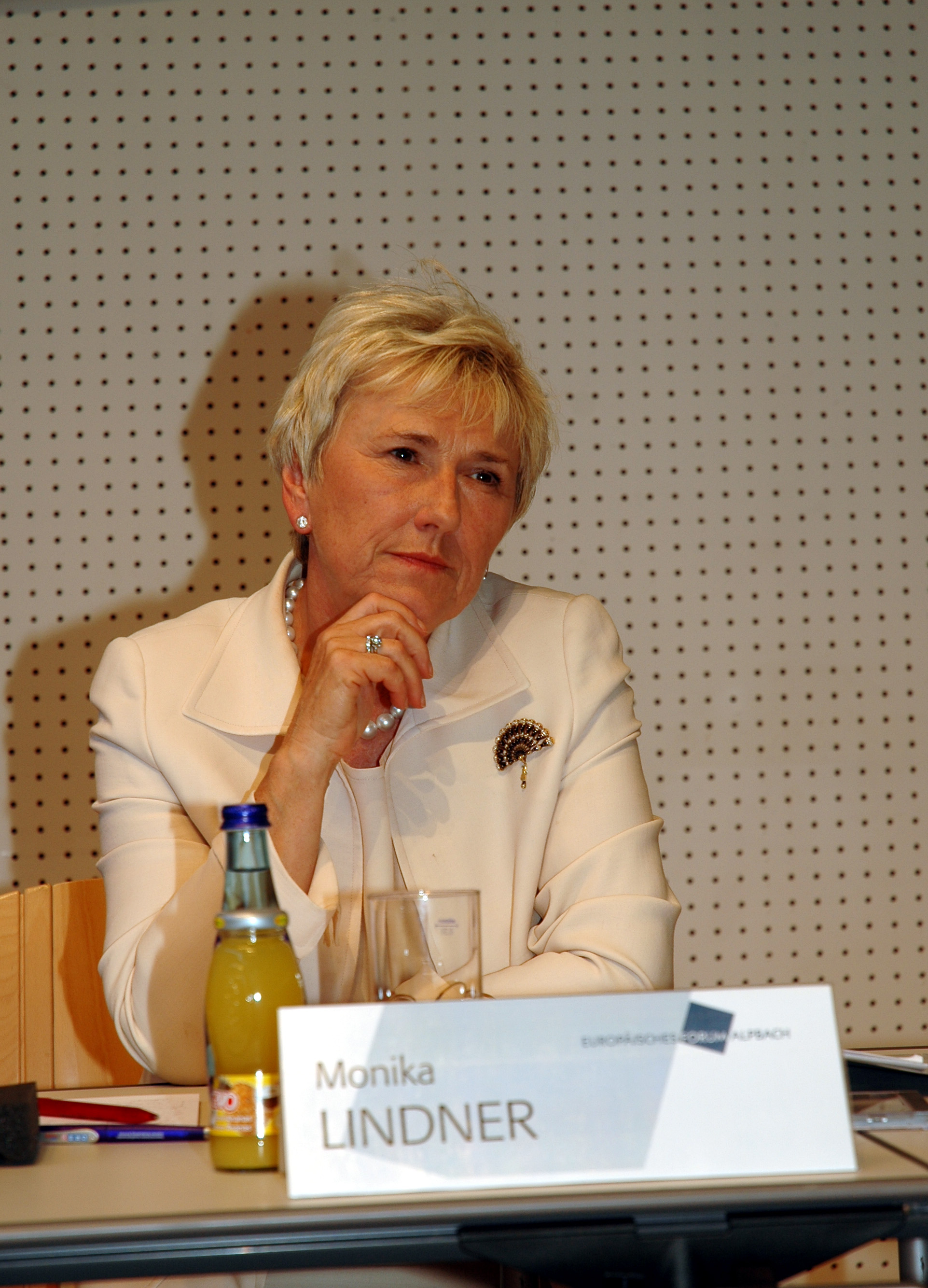 ORF-Generaldirektorin Monika Lindner bei einer Veranstaltung des Europäischen Forums Alpbach.